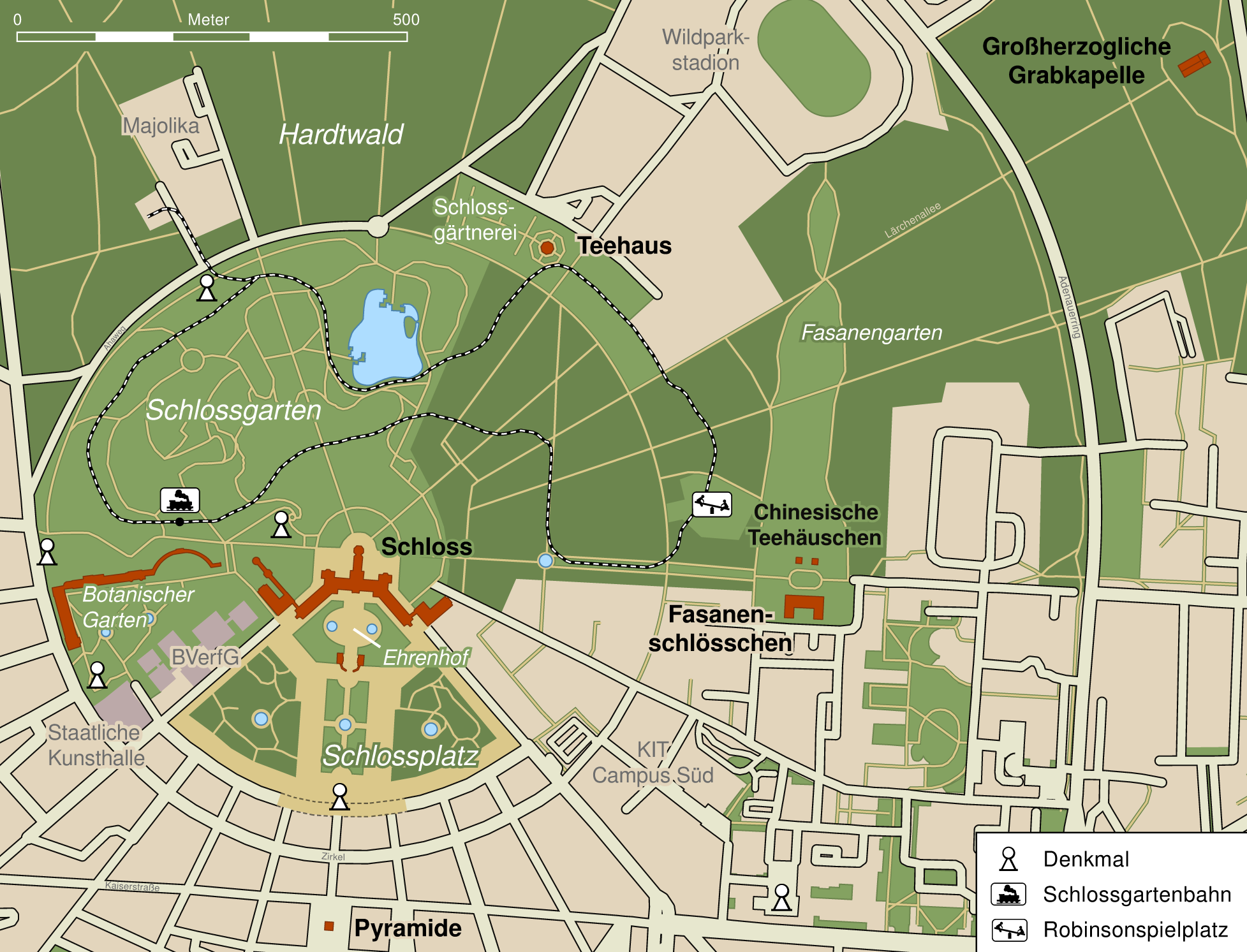 Karte vom Schloss Karlsruhe und den angrenzenden Gärten This map may be incomplete, and may contain errors. Don't rely solely on it for navigation.